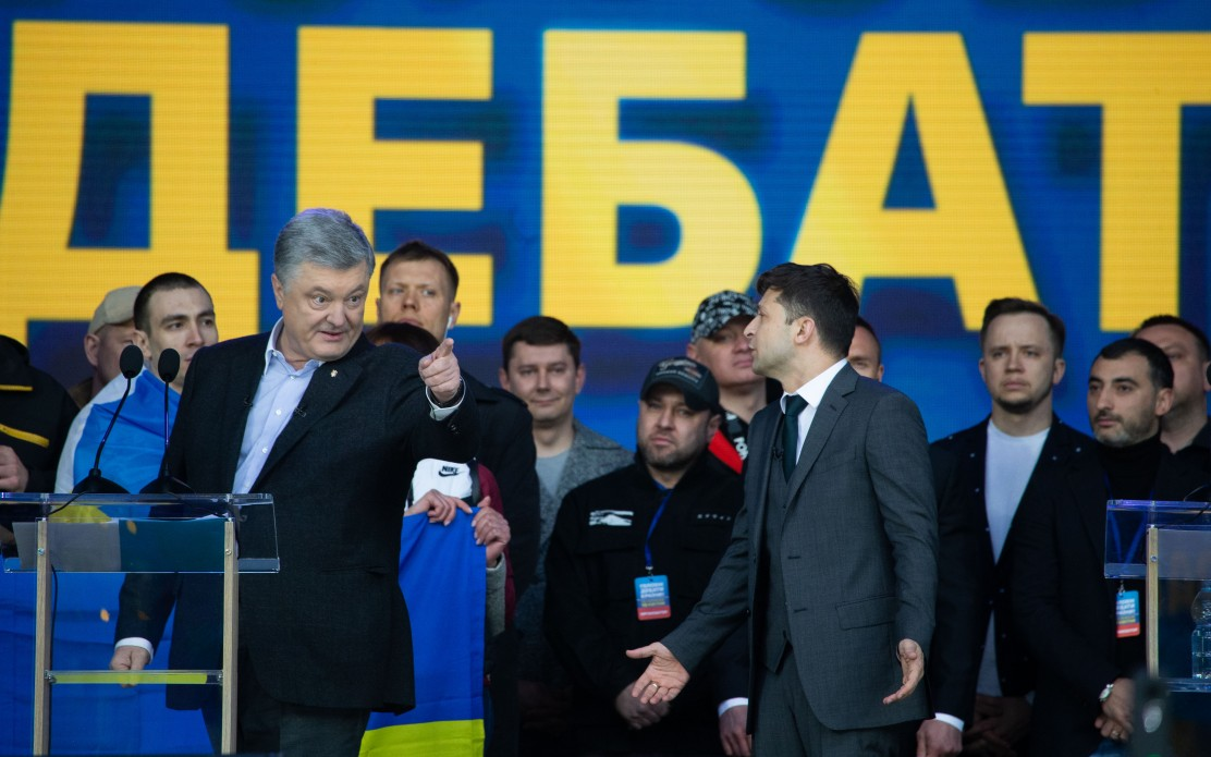 Дебаты кандидатов на пост Президента Украины Петра Порошенко и Владимира Зеленского